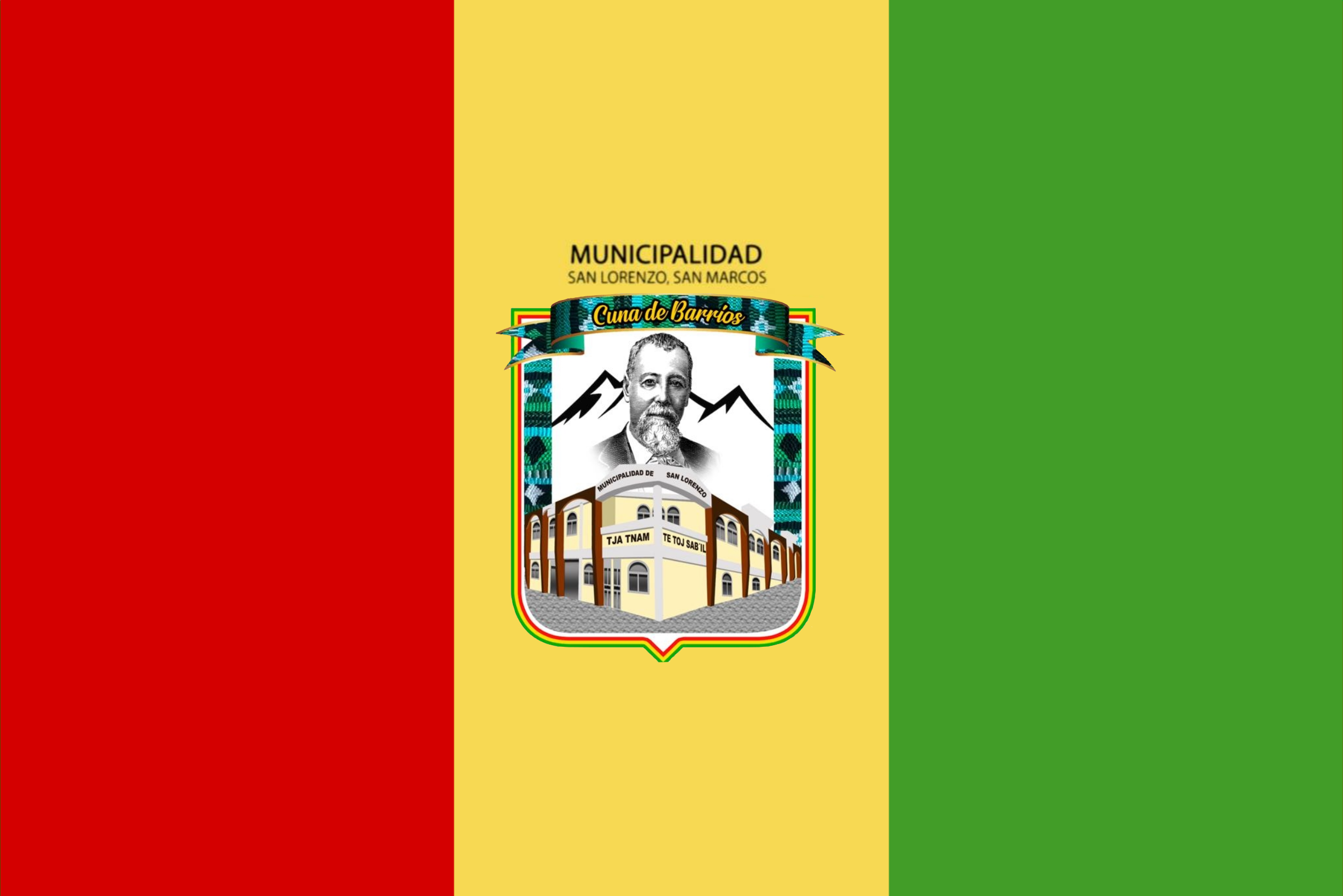 Bandera de San Lorenzo